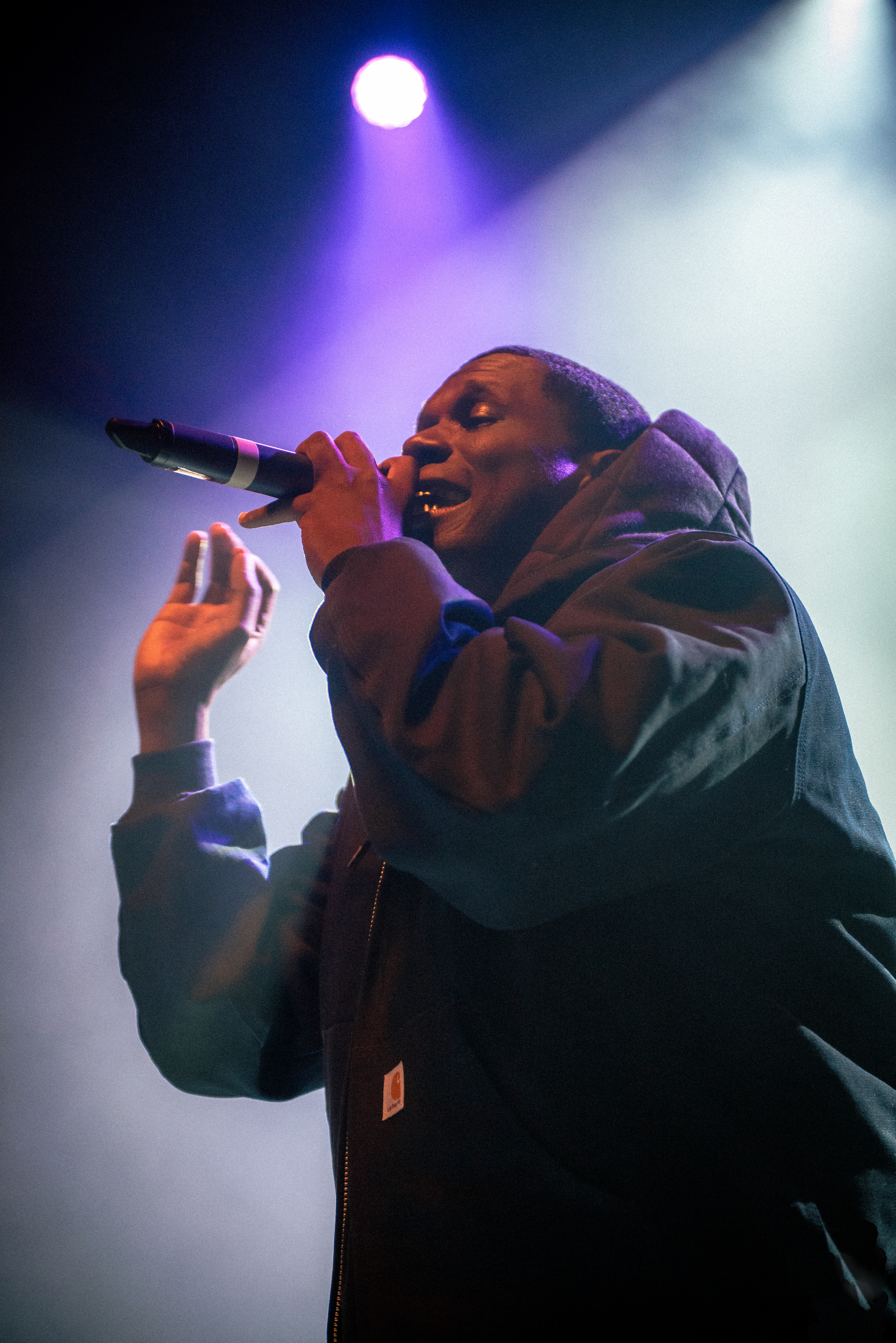 Jay Electronica